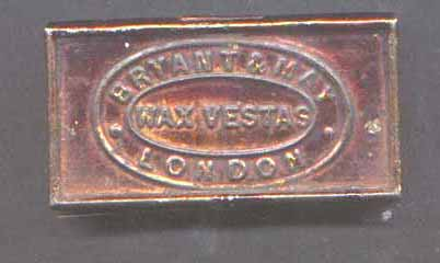 Bryant & May (Англия) около 1900 г. - Одна из ранних спичечных упаковок